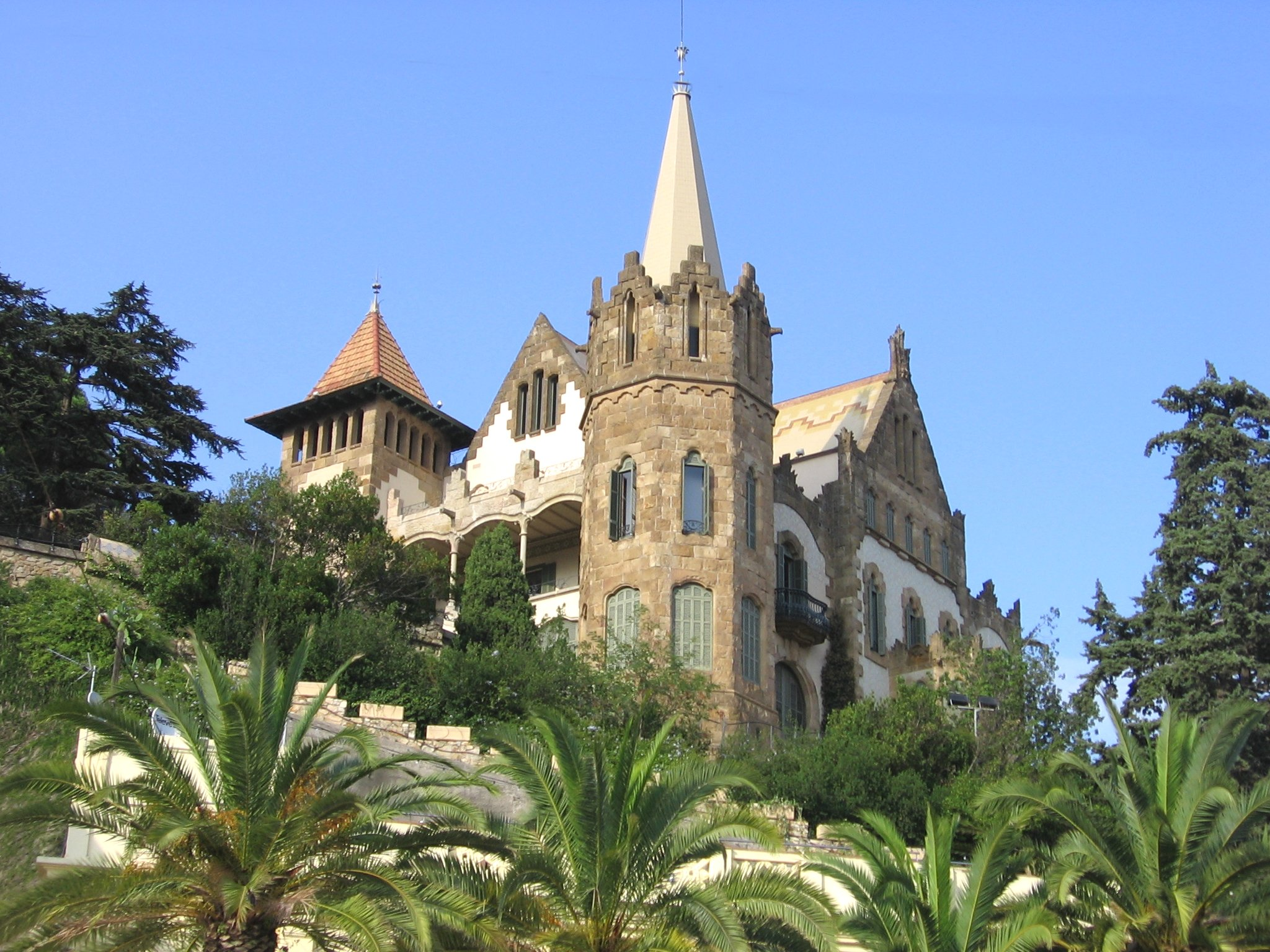 Casa Arnús (El Pinar), de Enric Sagnier